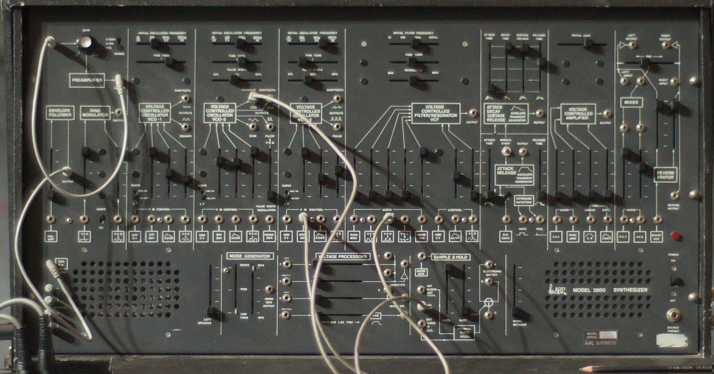 ARP 2600 by Esa Kotilainen Energo 2011 making of